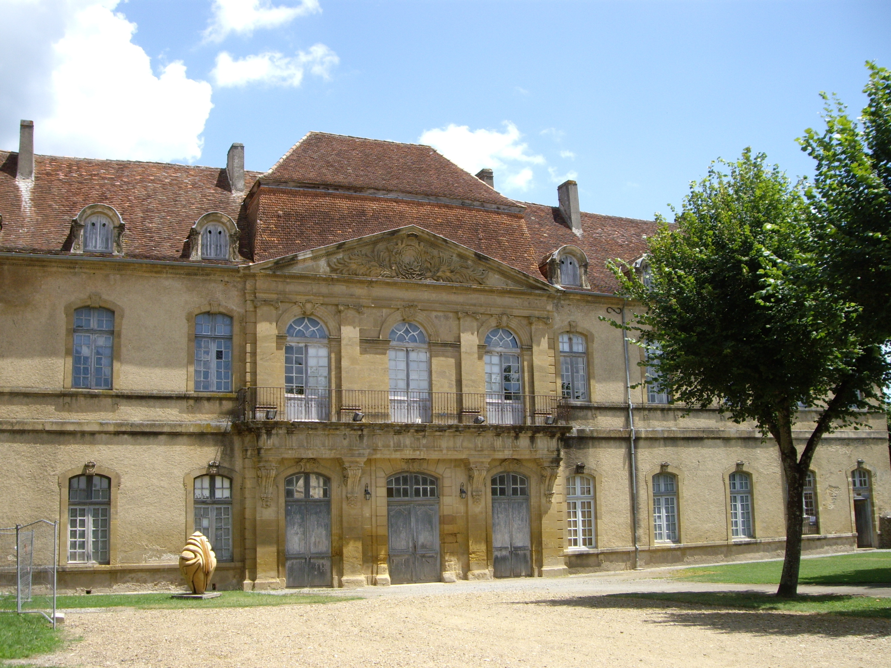 Mairie et abbaye de Saint-Sever-de-Rustan